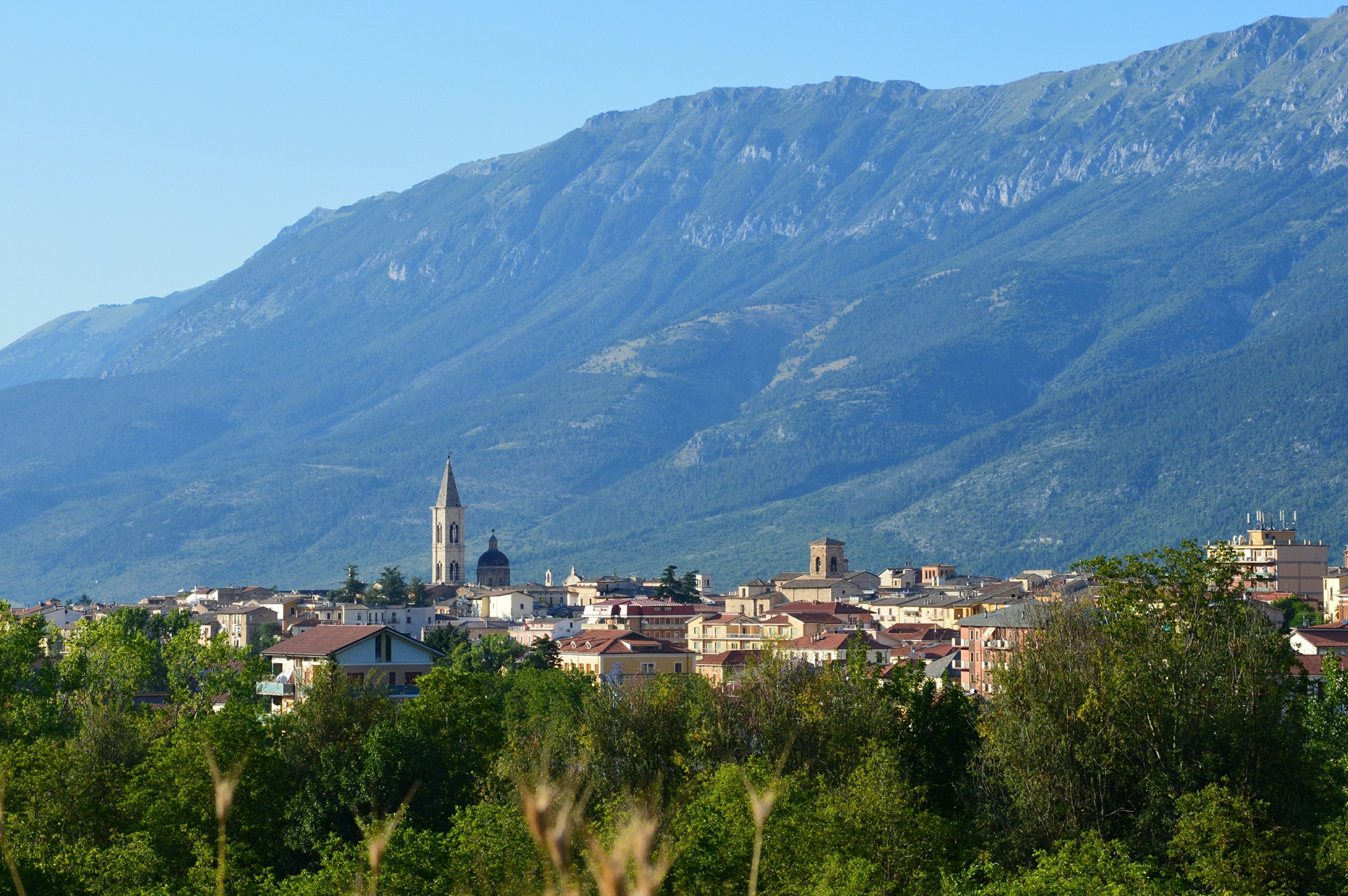 Panorama della città di Sulmona